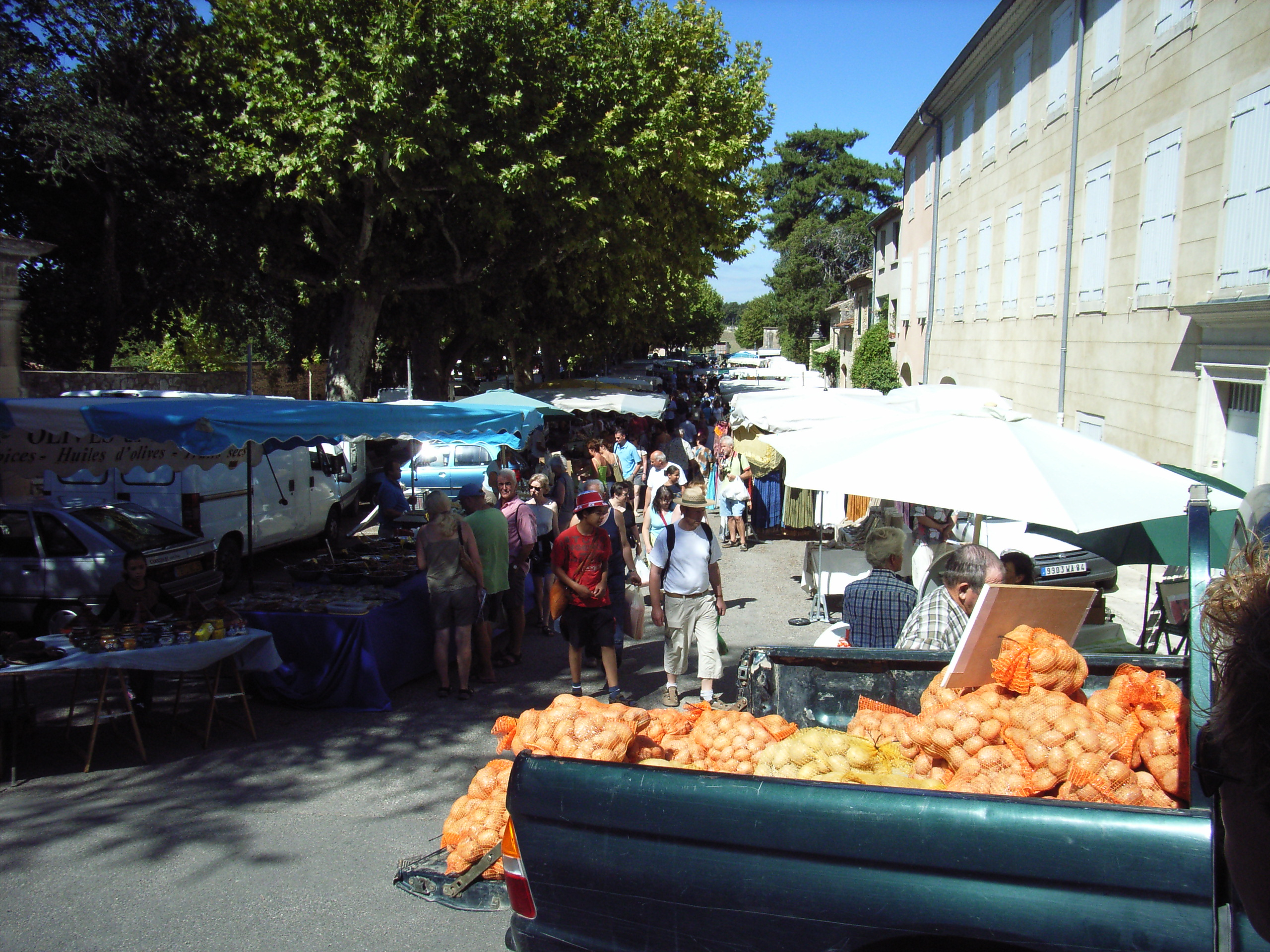 Weekly market in Grignan.